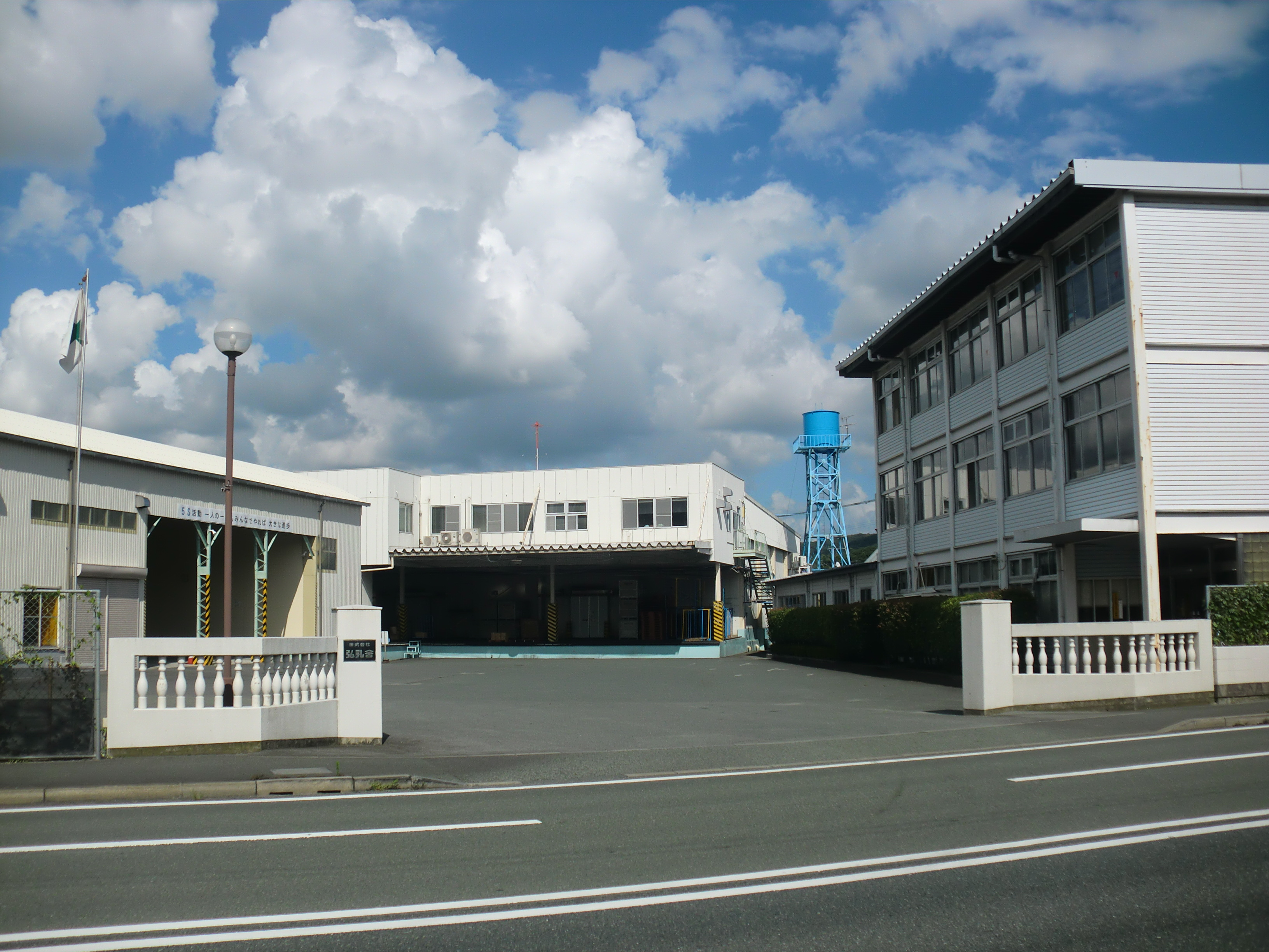 熊本市北区にある弘乳舎（こうにゅうしゃ）